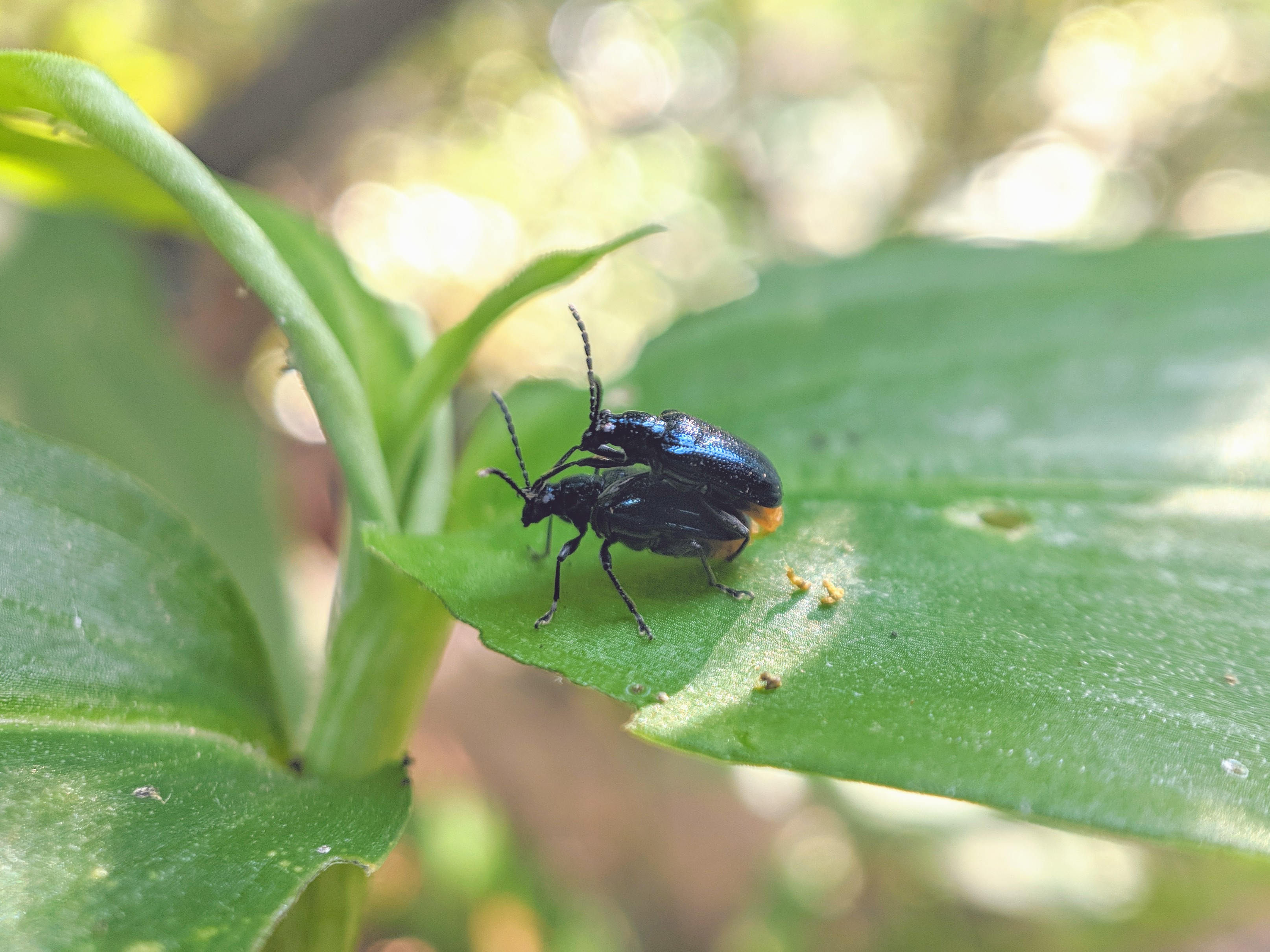 Lema concinnipennis